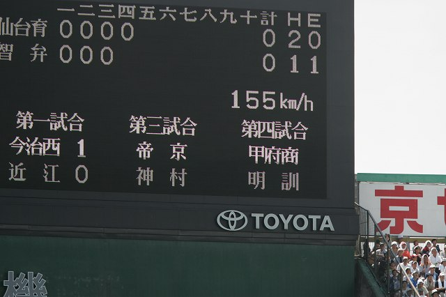 2007年の全国高校野球選手権大会において、仙台育英・佐藤由規が球速155km/hをマークした際の阪神甲子園球場スコアボード。